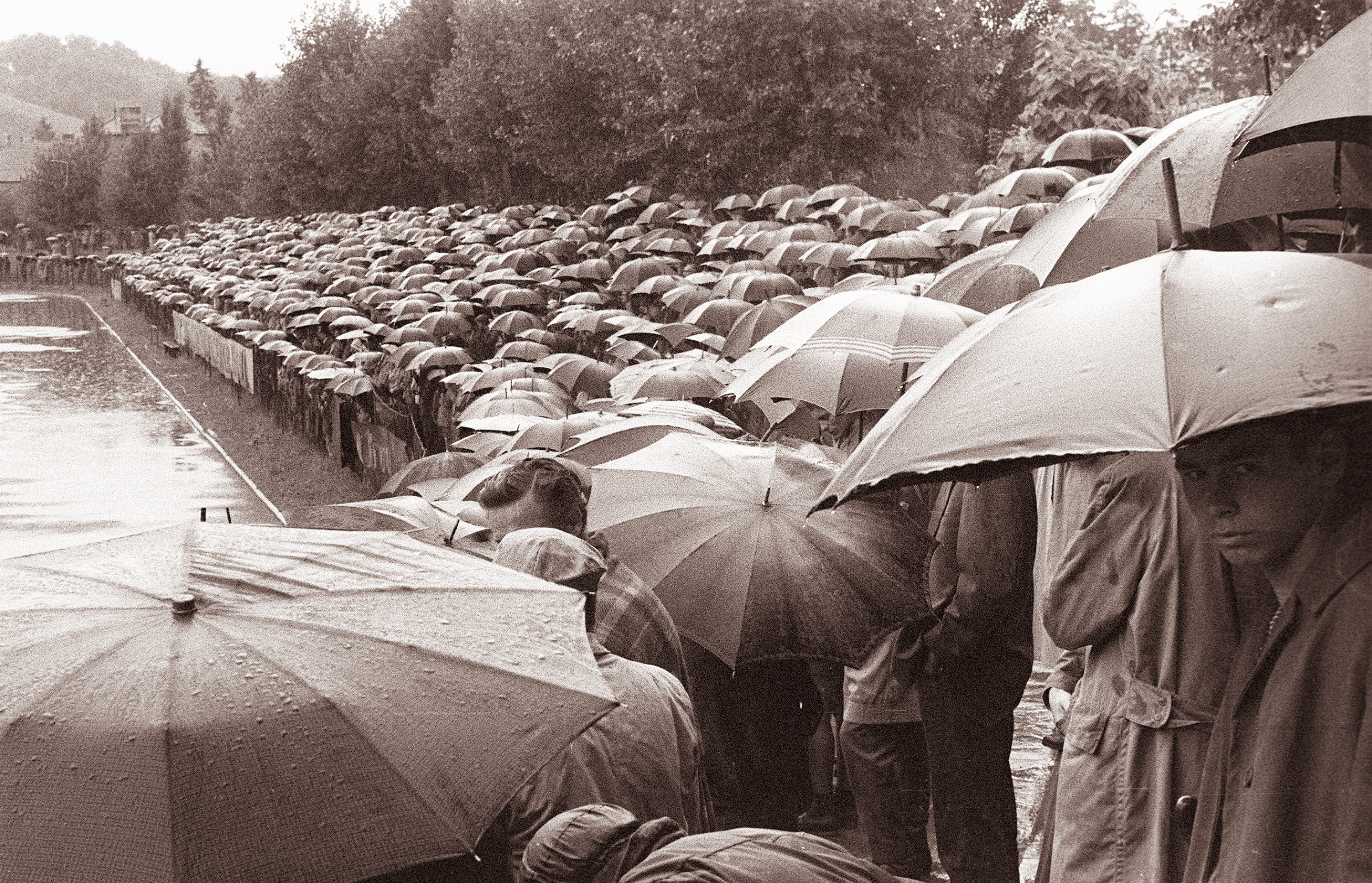 Gledalci na tekmi Maribor - Uljanik